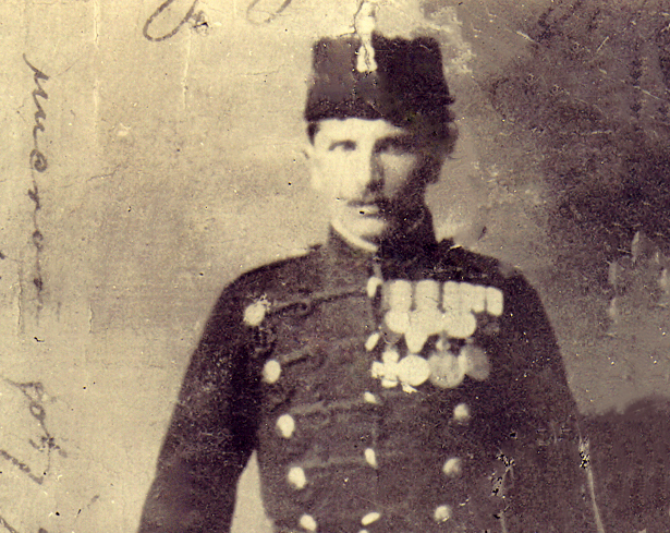 Српски (ћирилица): Српски олимпијац Драгутин Томашевић, као војник уочи Првог светског рата